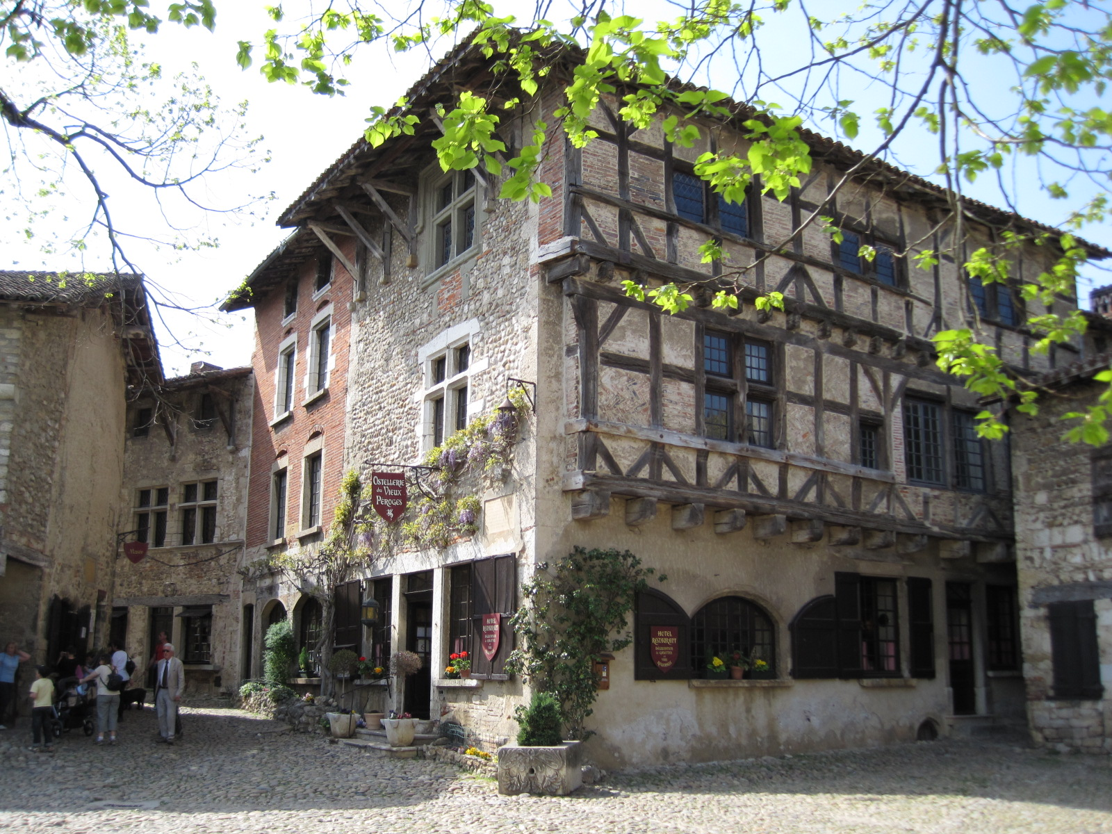 Pérouges